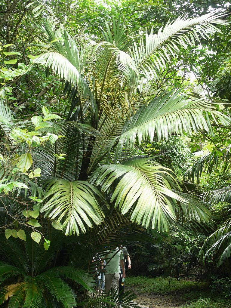 Arenga engleri(Arecaceae) Japanese name:KUROTUGU、クロツグ Date;2008,08.11;Seifa Utaki,Okinawa Island,Okinawa Pref., Japan Author;Keisotyo